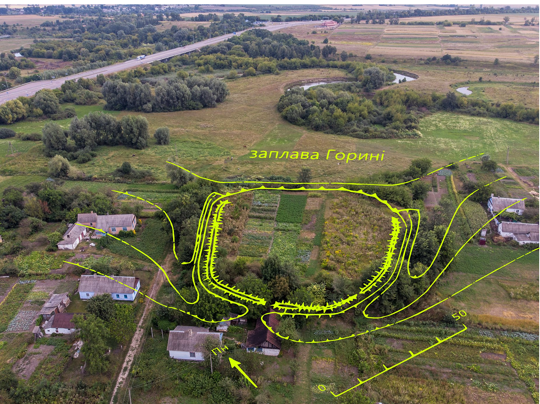 Горбаків Гощанського р-ну Рівненської обл. Городище розміщується в східній частині села в ур. Городище, на лівому березі р. Горині. Давнє укріплення збудували на корінному березі, що підвищується над заплавою ріки на 5,0-5,5 м (рис. 18). Майданчик близький до чотирикутного в плані, із округленими кутами, розмірами 60×55 м (площа 0,3 га). З трьох сторін (за винятком північно-східної, звернутої до річки), захищений валом, який має найбільшу висоту із напільної південно-західної сторони (до 1,5 м), із північного заходу його висота 1,0-1,3 м, а із південного сходу не перевищує 1 м. Майданчик використовується під городи, внутрішній схил валу руйнується під час оранки. Ерозія берегів ріки в напрямі Валу за 40 років - 50 метрів.